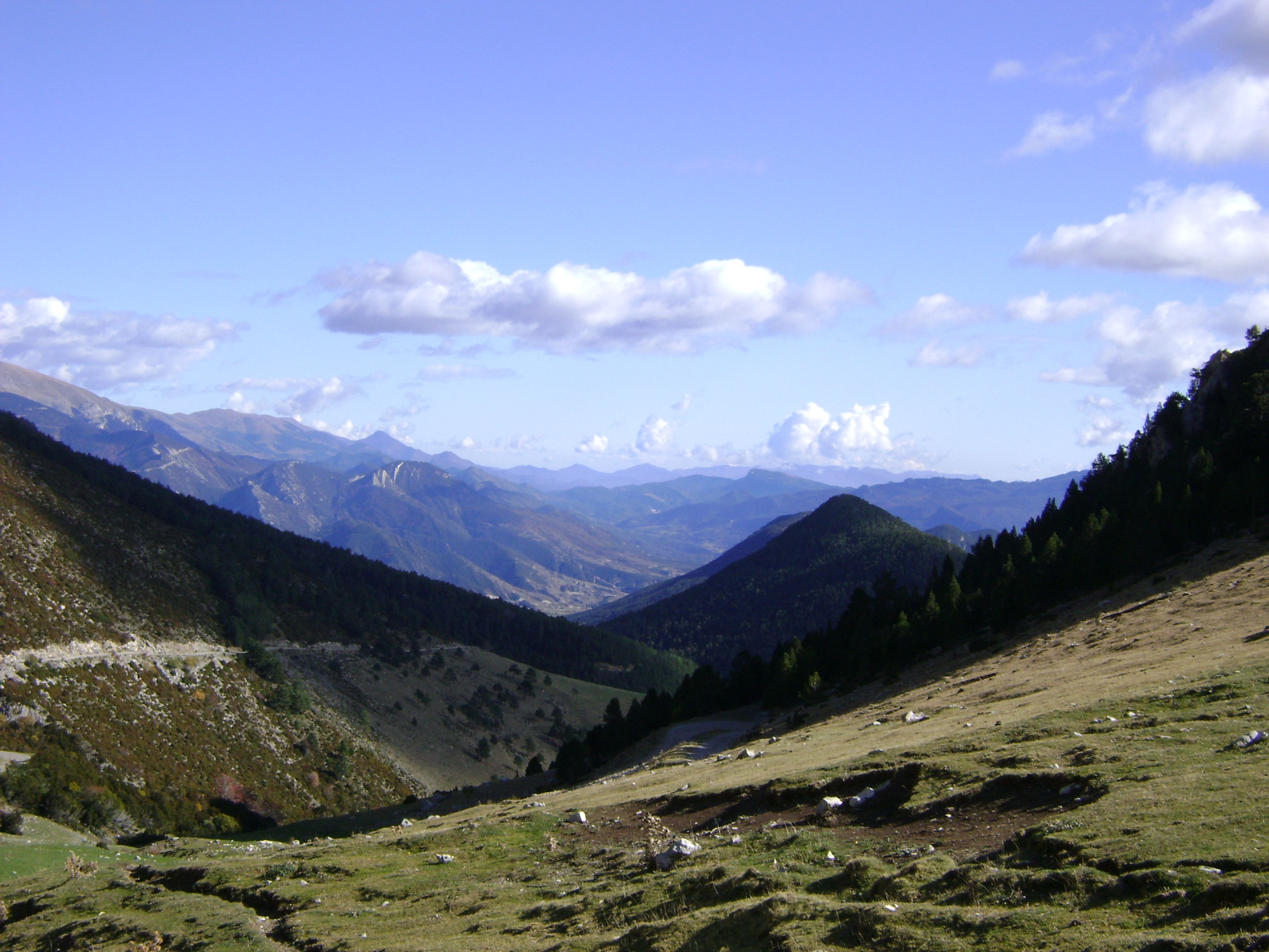 Camino y vista desde el Collado de Torn. En el Cadi-Moixero, tramo Baga-Gósol.